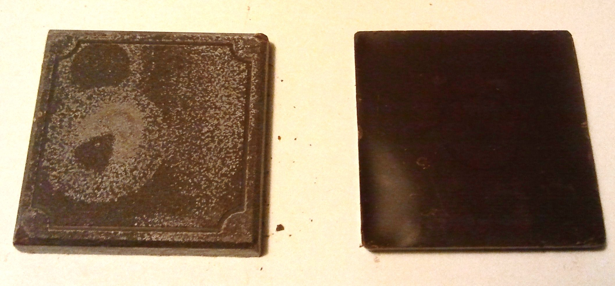 Dues pastilles de xocolata, a l'esquerra succeeix el fenomes del fat bloom, a la dreta hi ha una pastilla de xocolata en perfectes condicions